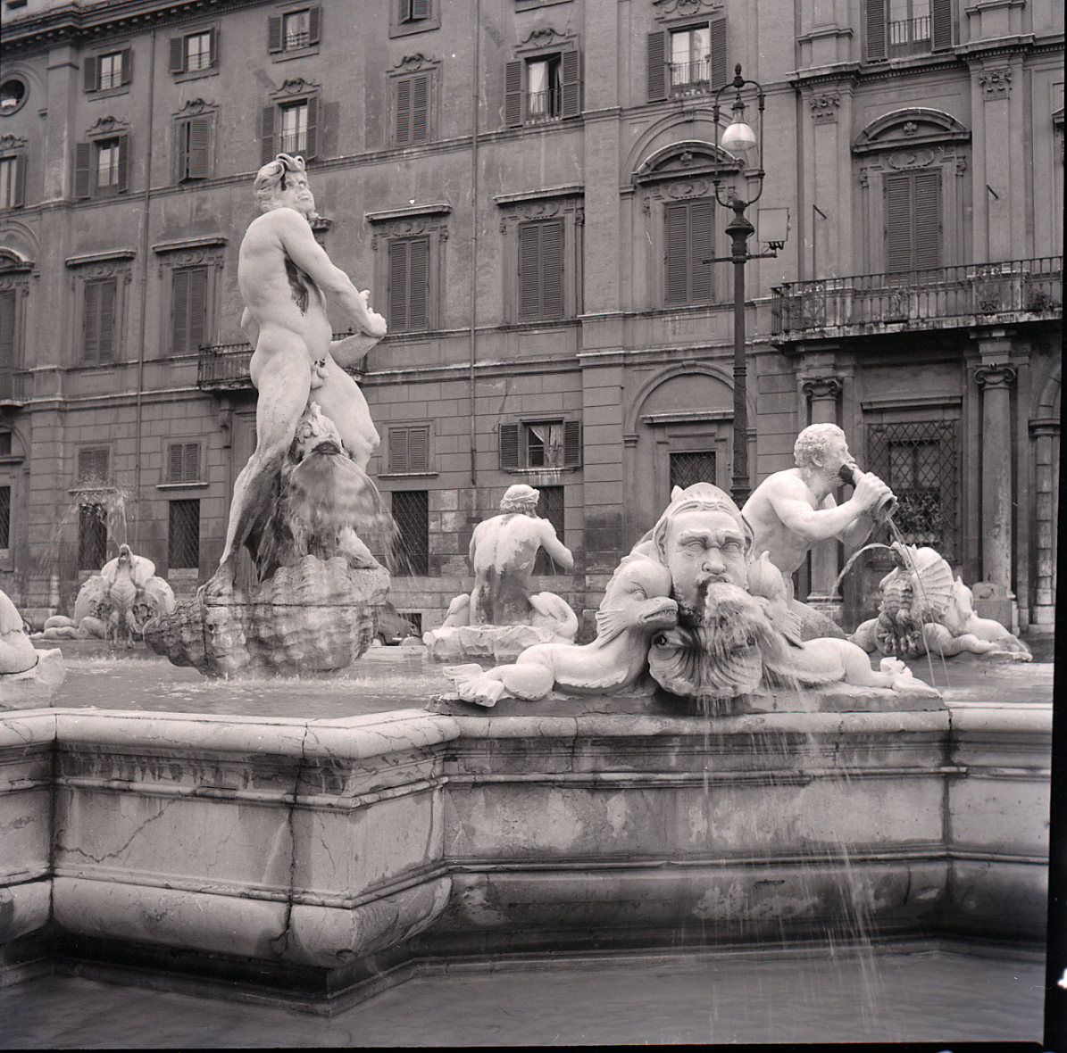 Servizio fotografico : Roma, 1960 / Paolo Monti. - Buste: 40, Fototipi: 40 : Negativo b/n, gelatina bromuro d'argento/ pellicola ; 6x6. - ((Serie costituita da 40 negativi identificati con i nn.: 10075-10114. Numerazione parallela: 176-215. Sulla busta R10075 manoscritto: "Navona". La suddetta serie è contenuta nella scatola identificata con la numerazione R9871/10253. Sul coperchio iscrizione manoscritta a pennarello: "Roma (2)".